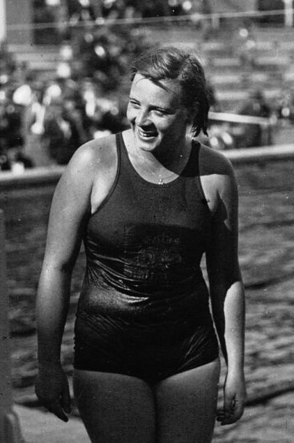 Les Tourelles : Championnats d'Europe : Mlle Braun, 100 m dos (portrait à 3 m) : [photographie de presse] / Agence Meurisse